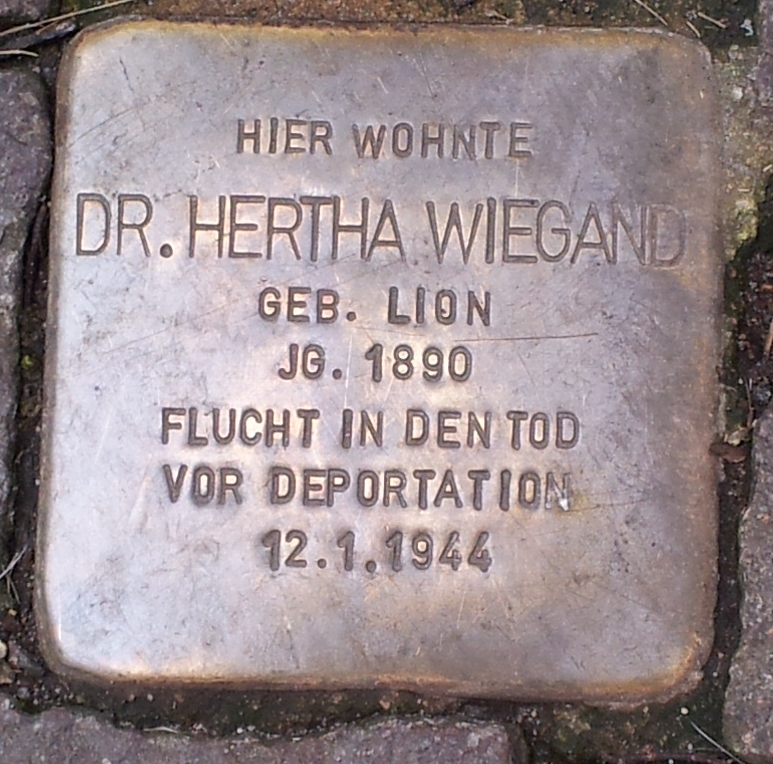 Stolperstein für Dr. Hertha Wiegand vor dem Haus Wasserstr. 8 Offenburg